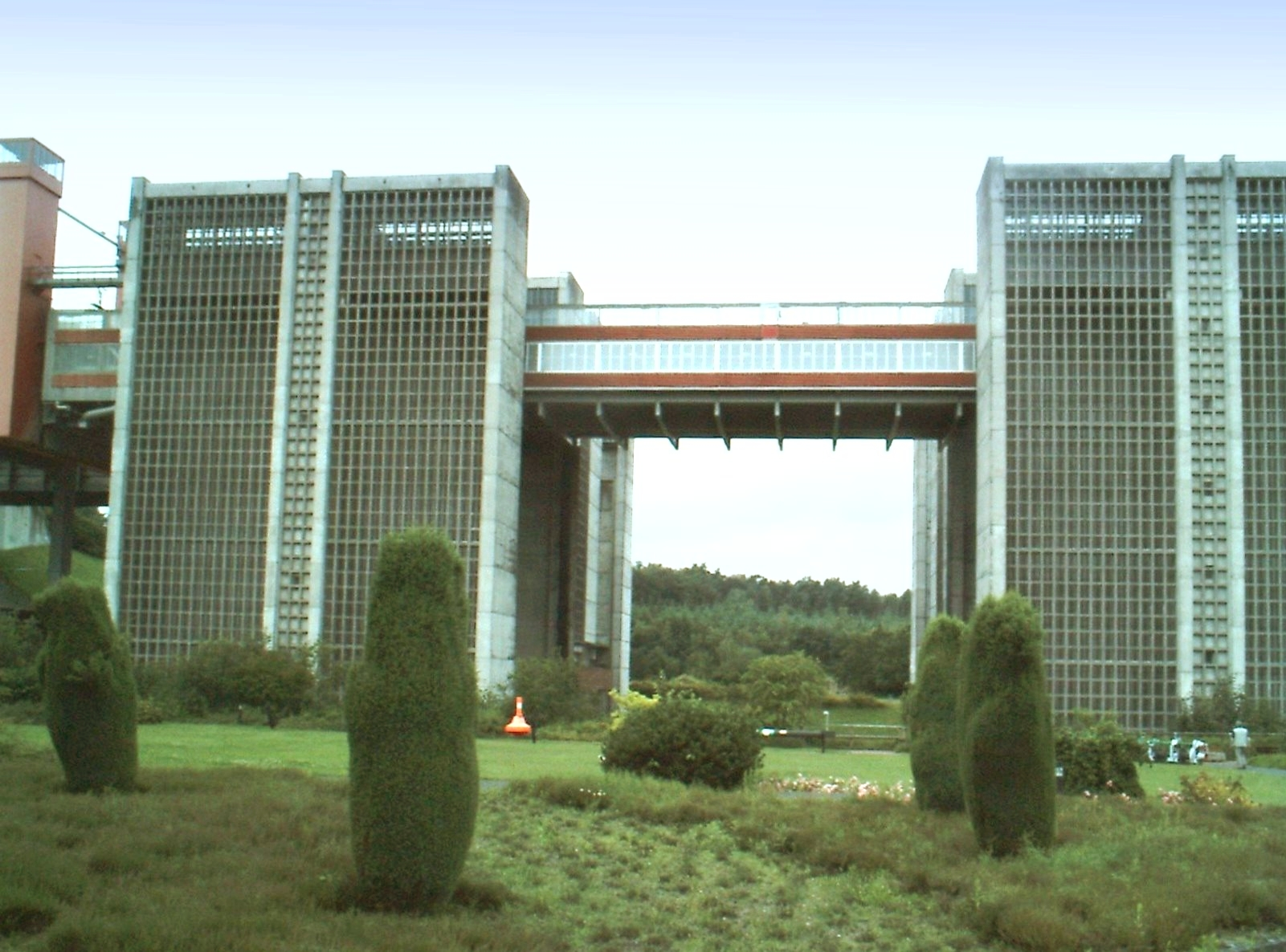 Beschreibung: Schiffshebewerk Scharnebeck, beide Tröge sind oben Fotograf: presse03, selbst fotografiert, Sommer 2004 Lizenz: GNU-FDL